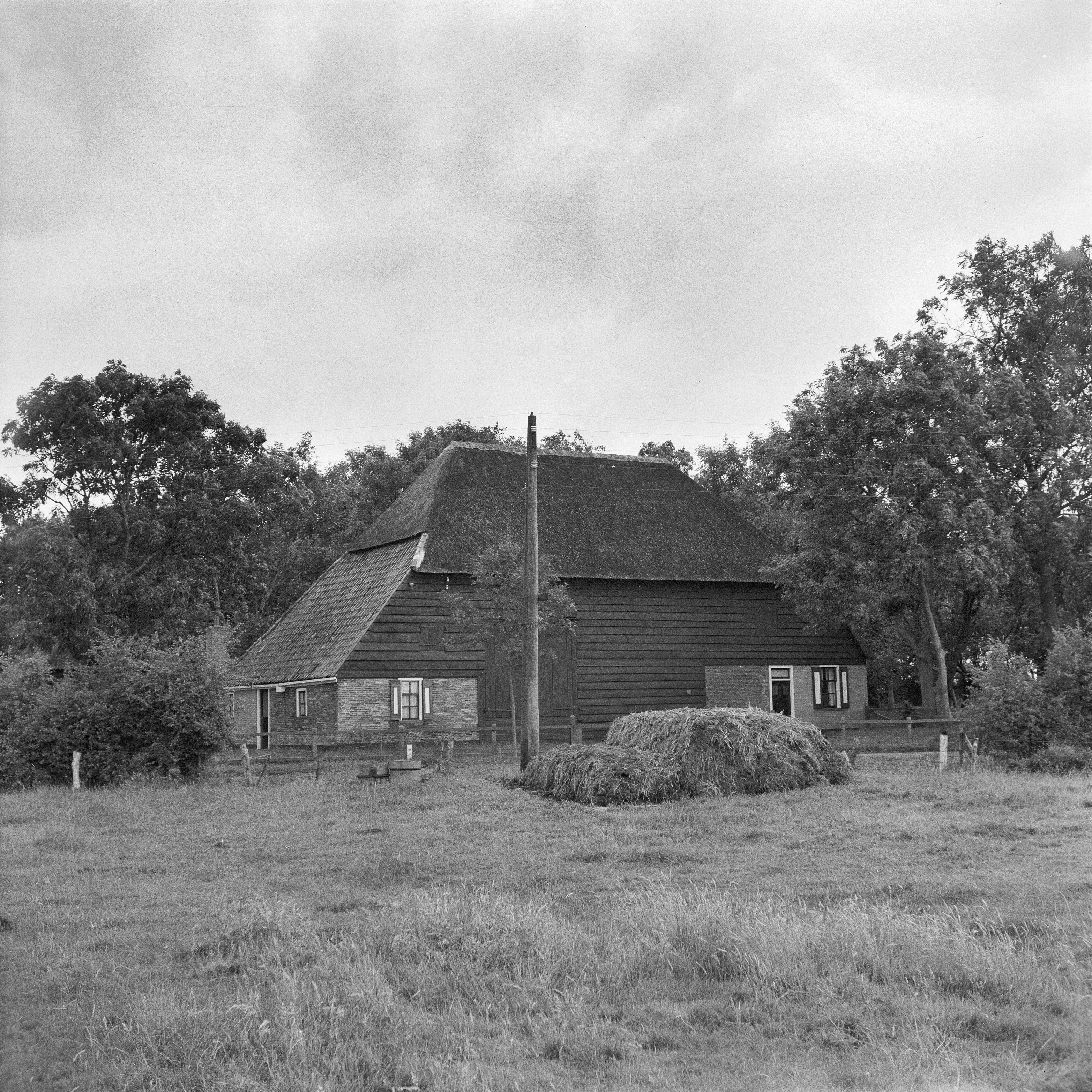 36, overzicht